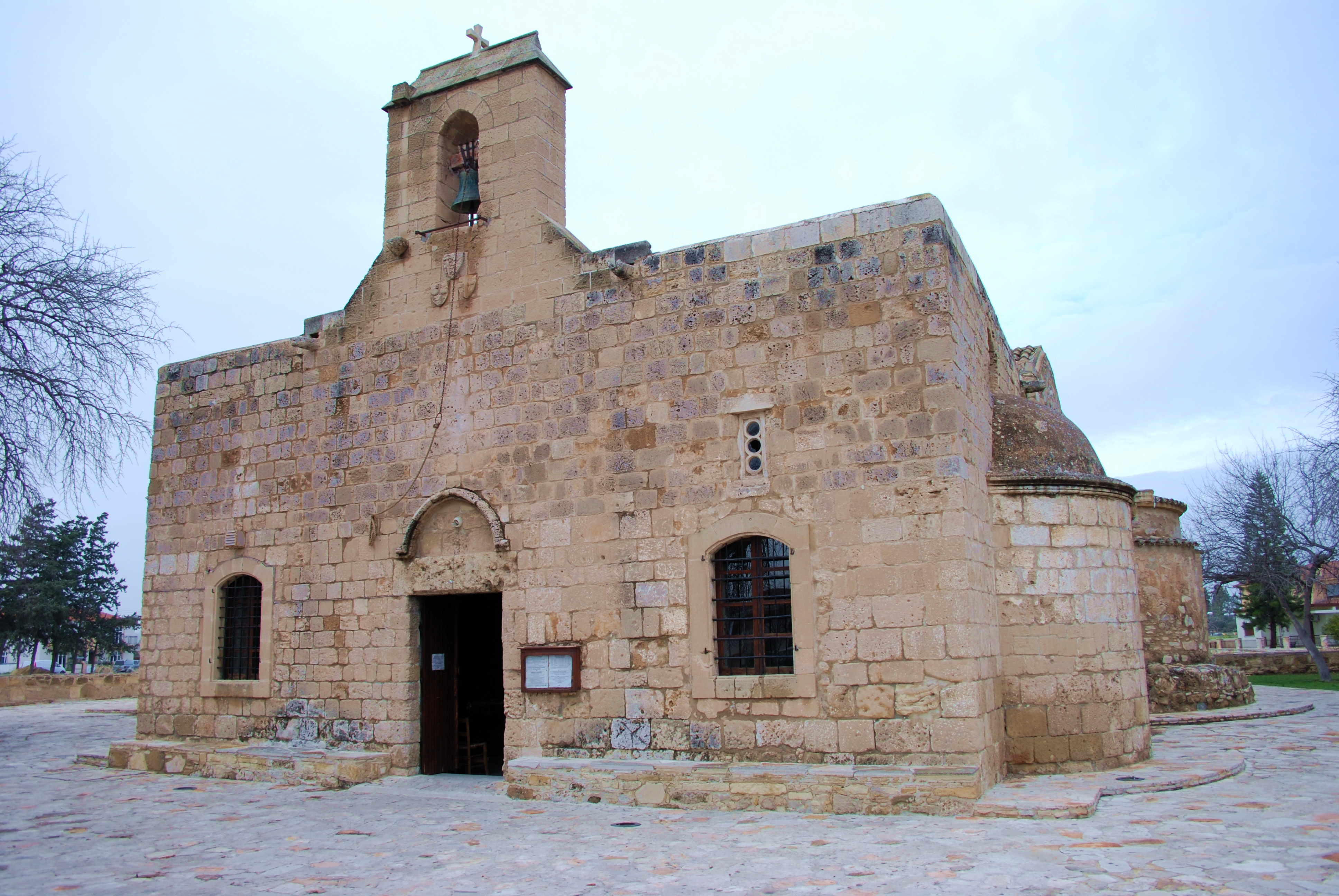 Panagia Aggeloktisti, Kiti.